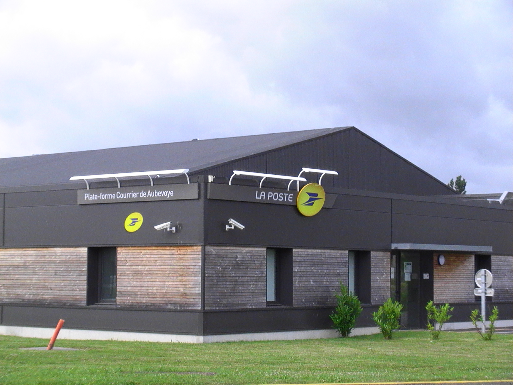 Centre de tri postal du Val-du-Hazey